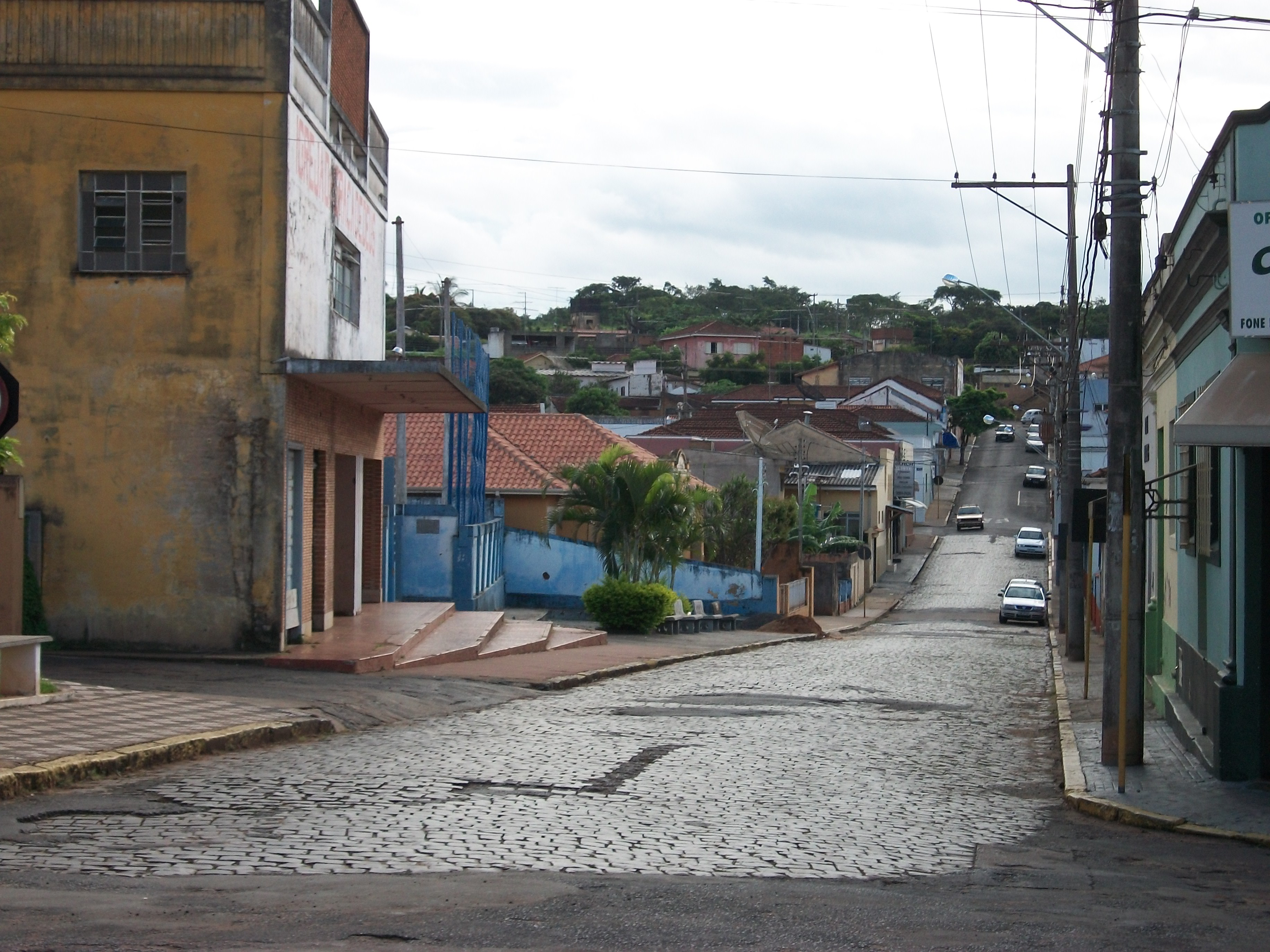 Strasse 20. August, São Simão-SP; 19. Februar 2010.